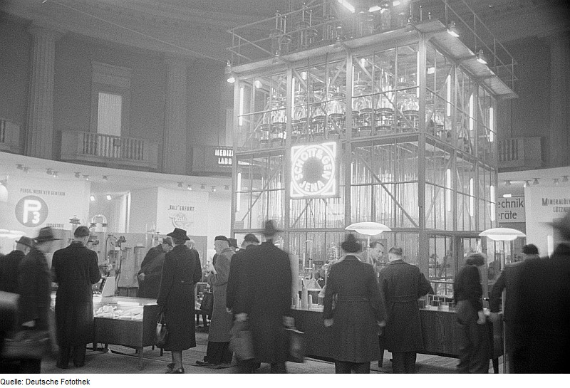 Original image description from the Deutsche Fotothek Messebesucher vor dem Exponat des Jenaer Glaswerks Schott & Gen.